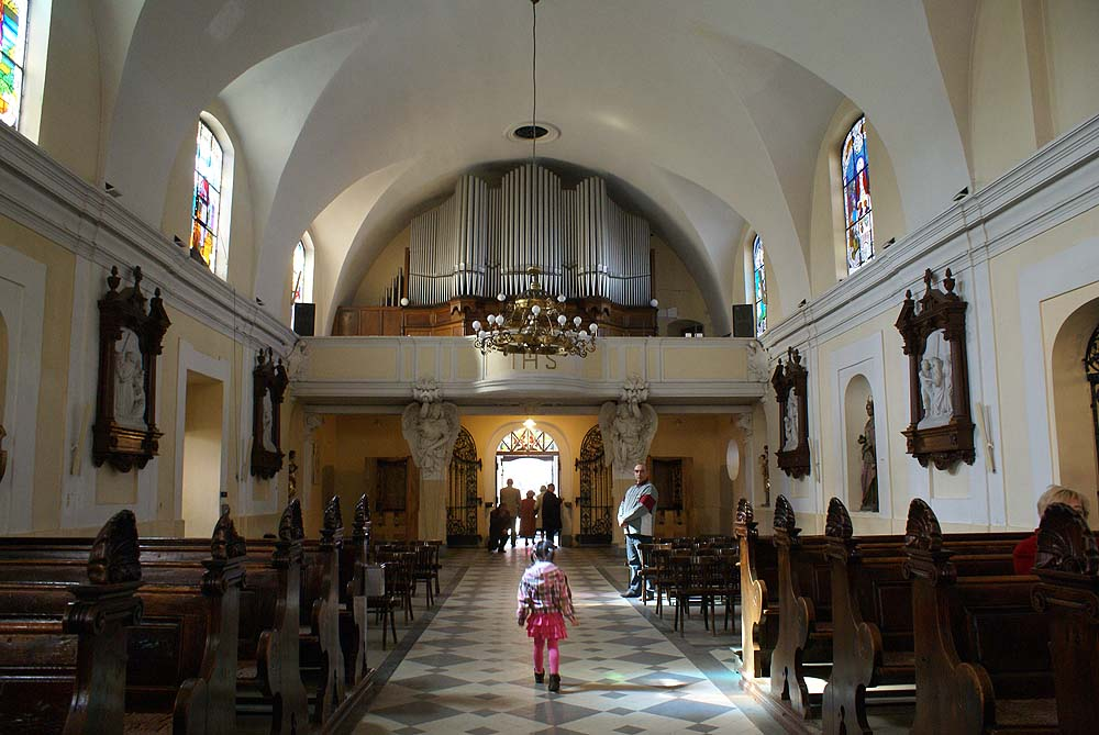 Kościół św. Maurycego Traugutta 36, Miasto Wrocław - Krzyki